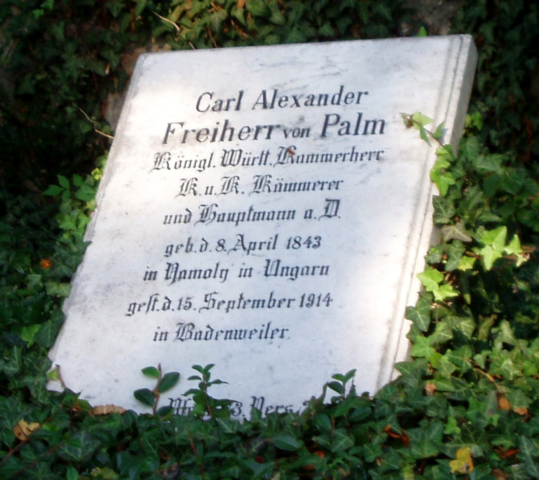 Grab eines der Freiherren von Palm auf dem Friedhof St. Bernhardt